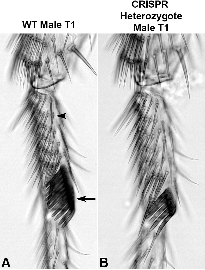 Bein einer männlichen Drosophila-Fliege. Der Geschlechtskamm ist im linken Bild sichtbar. Auf der rechten Seite ein Mutant.